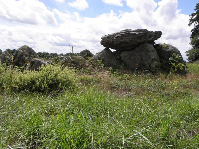 Dolmen du Rocher-Jacquiaux à Saint-Germain-en-Coglès (35).